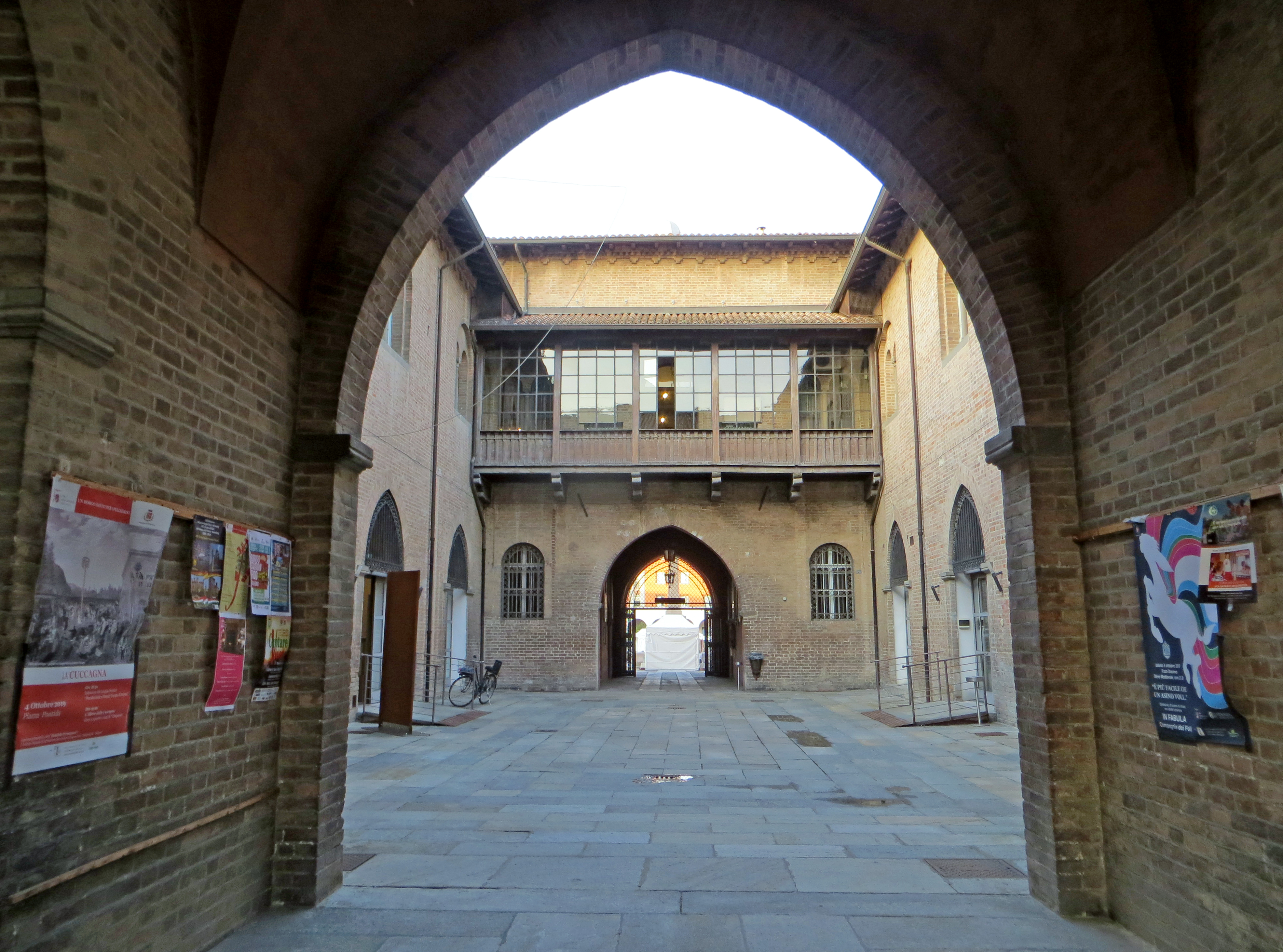 Palazzo Comunale (Fidenza) - lato nord del cortile interno